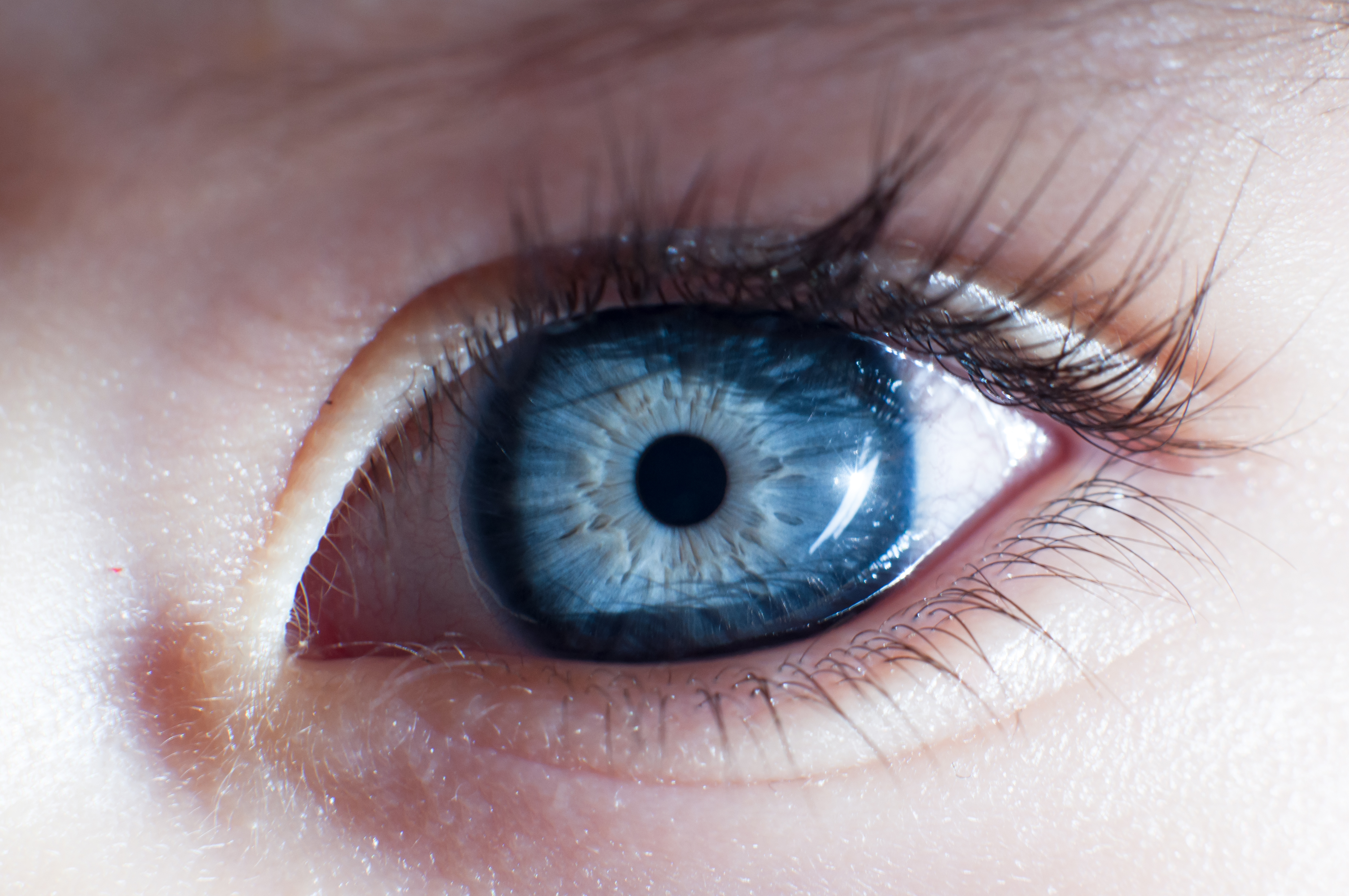 Milla, presque 10 mois...